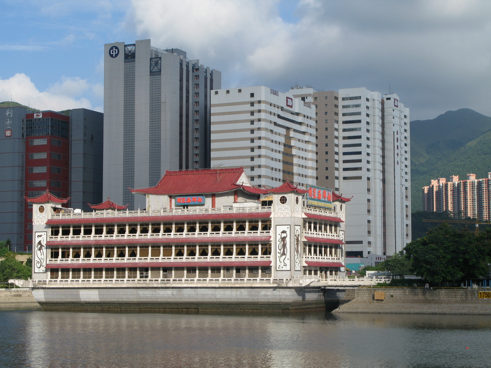 沙田明星海鮮舫